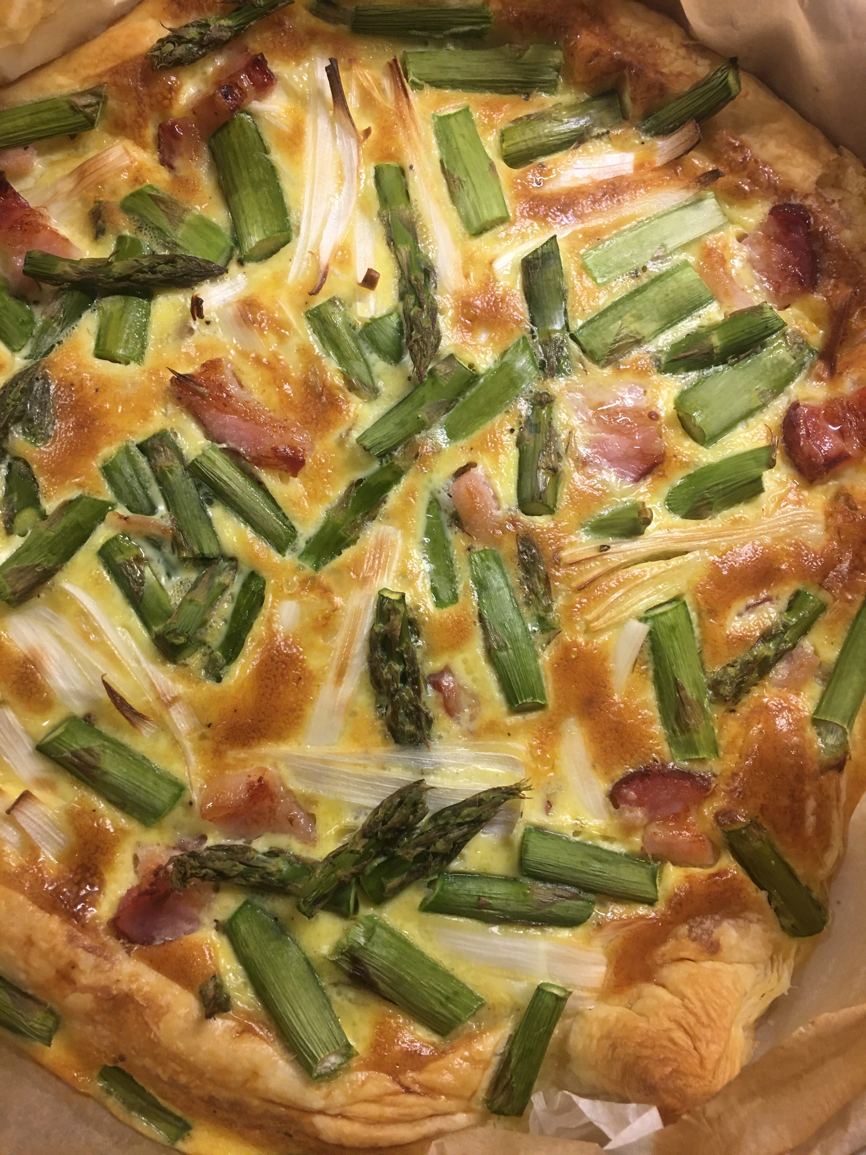 Tarta ze szparagami